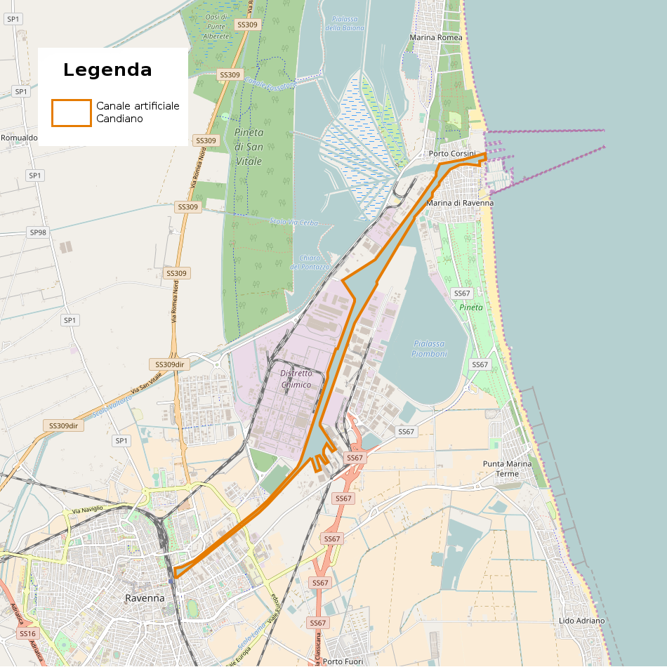 Mappa del canale artificiale Candiano di Ravenna This map may be incomplete, and may contain errors. Don't rely solely on it for navigation.